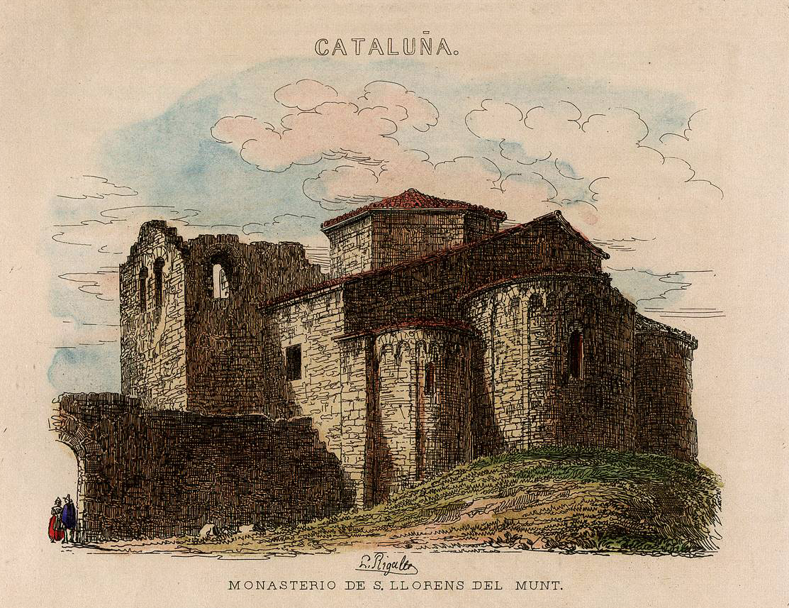 Monasterio de S. Llorens del Munt.